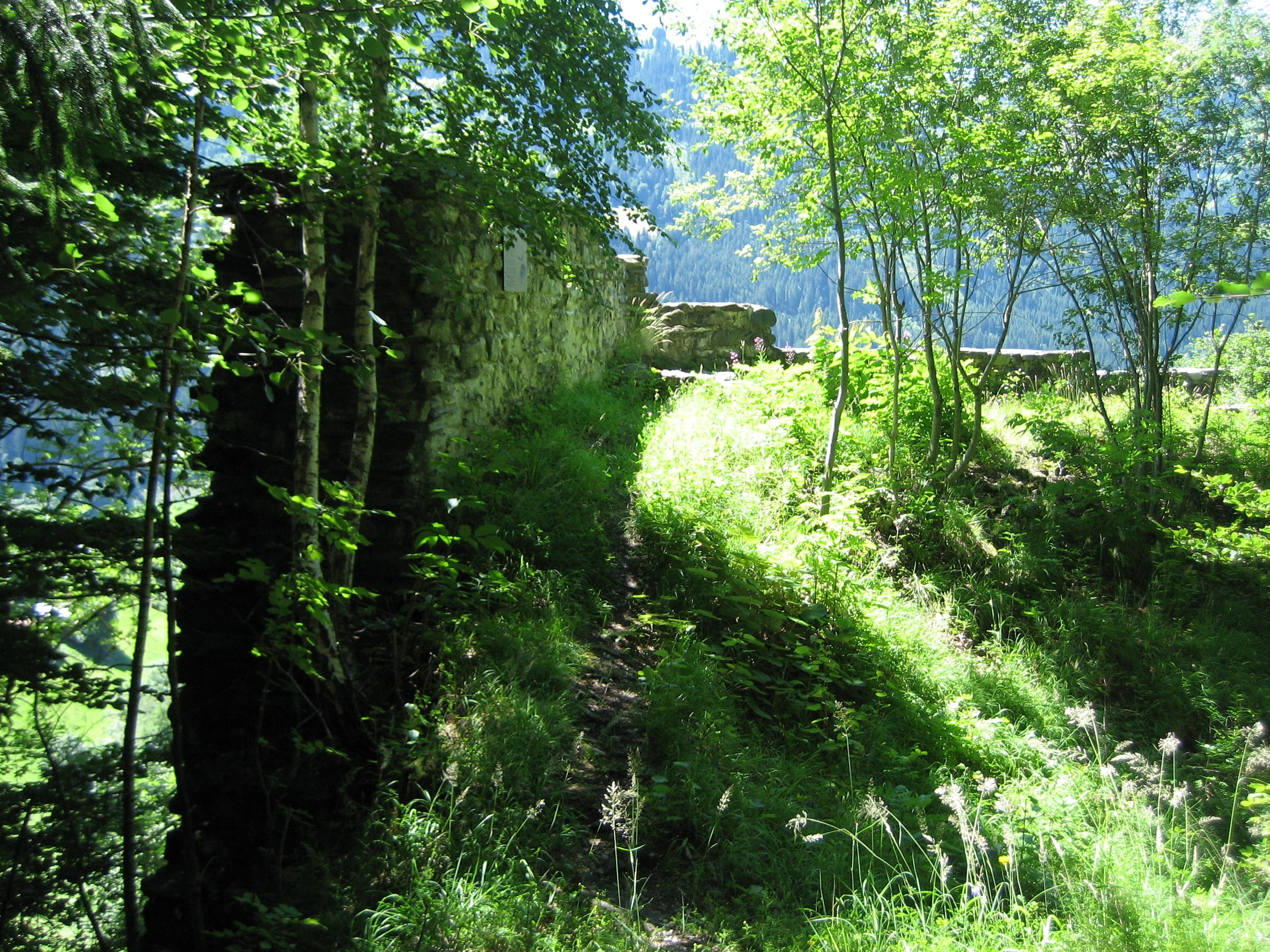 Ansicht von NE